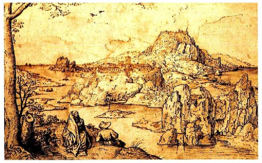 Peter Brueghelek tintaz egindako Paisaia marrazkia.